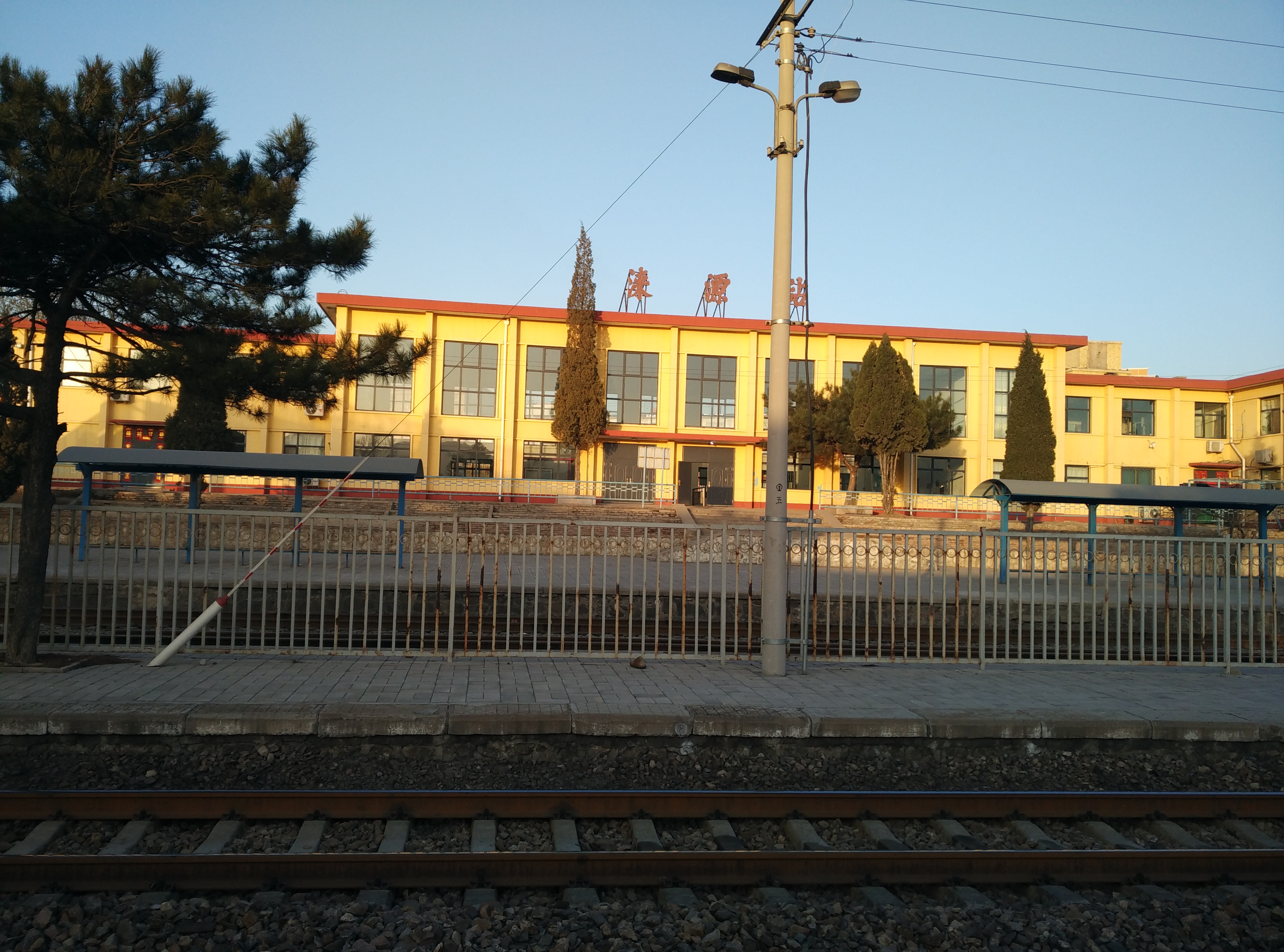 中文（中国大陆）: 涞源站第三站台拍摄的站房及一、二站台